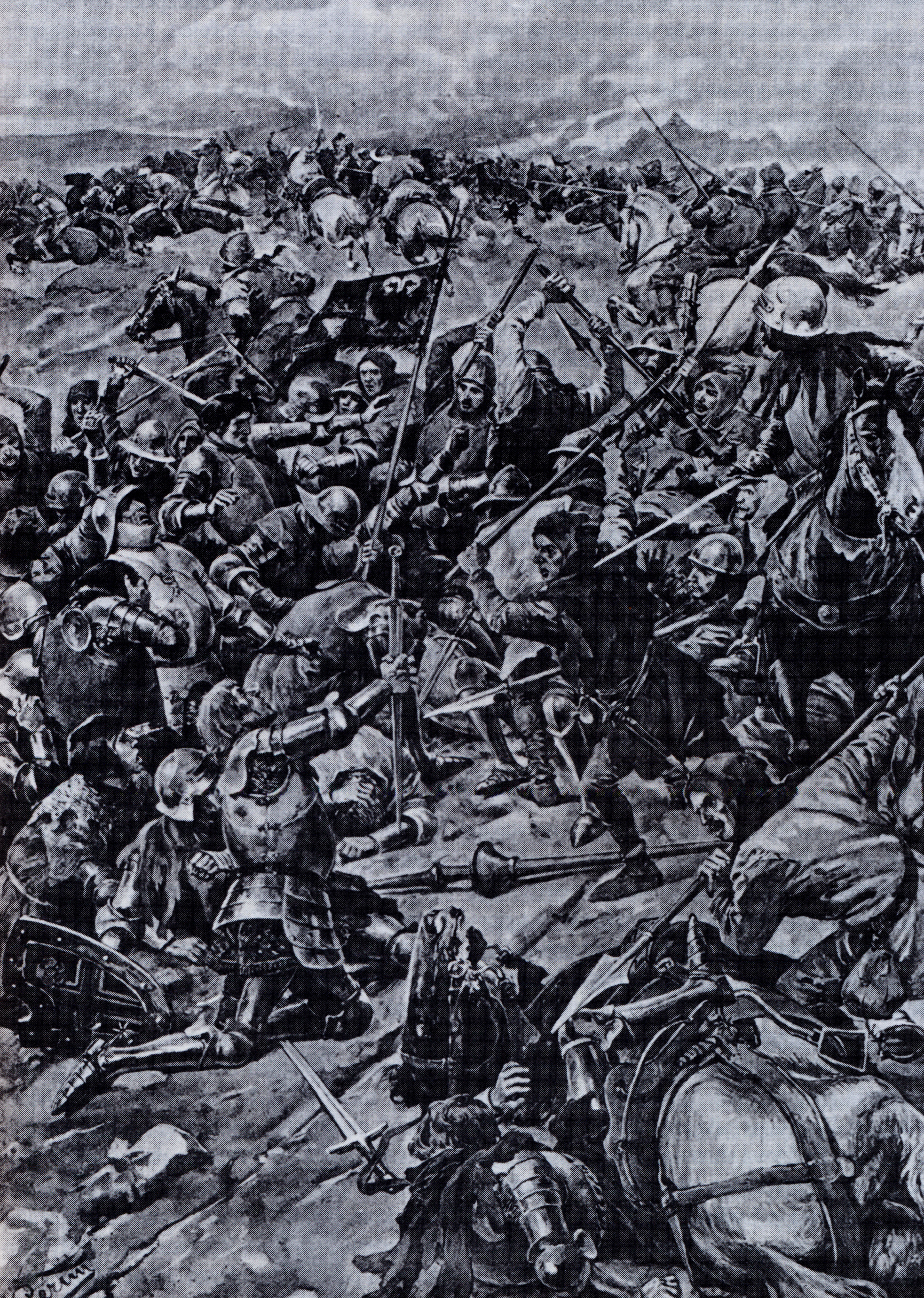 Bitva husitů s německým vojskem 16. června 1426 na návrší jménem Na Běhání nedaleko Ústí nad Labem.